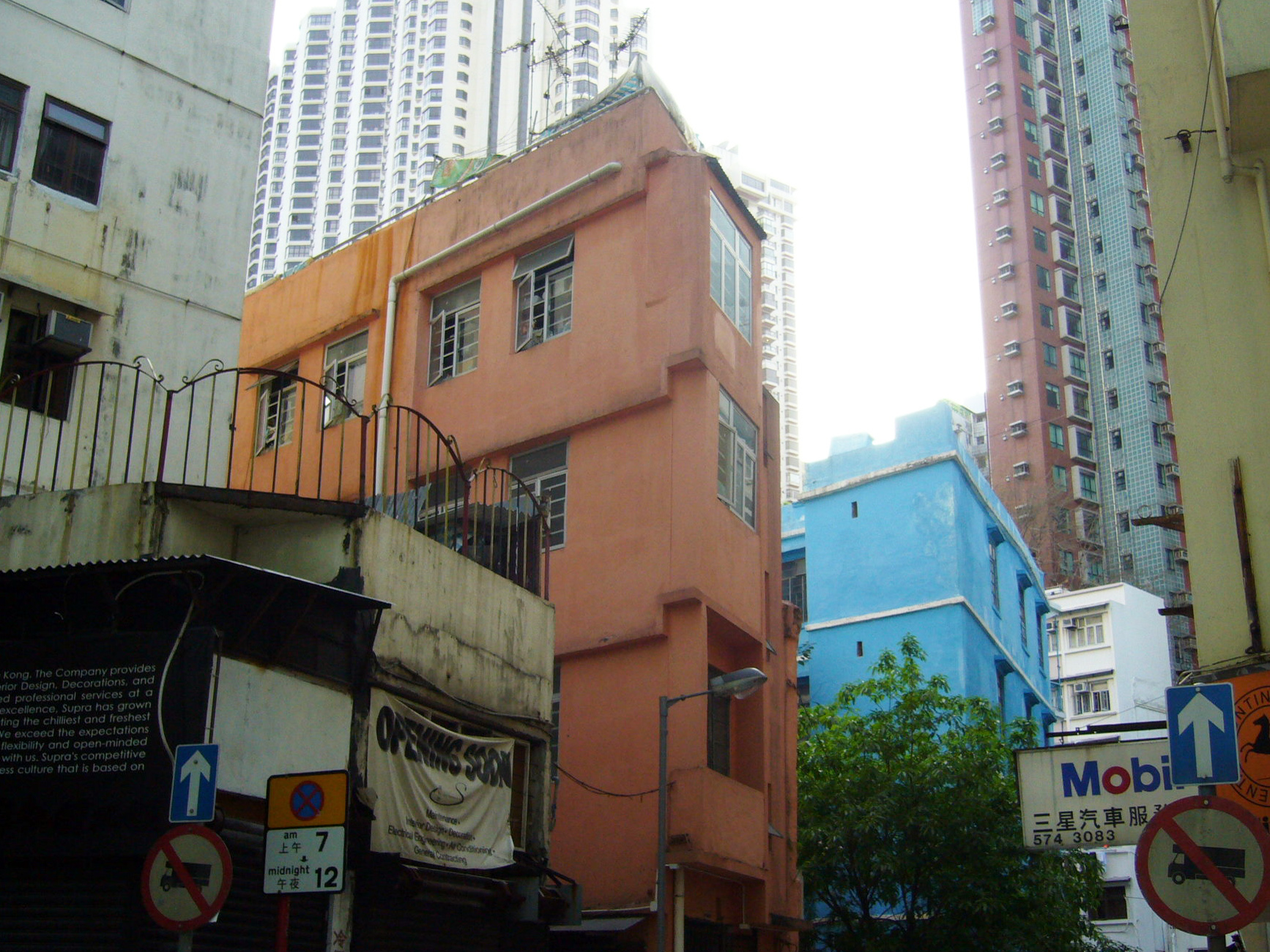 中文（香港）: 景星街橙屋